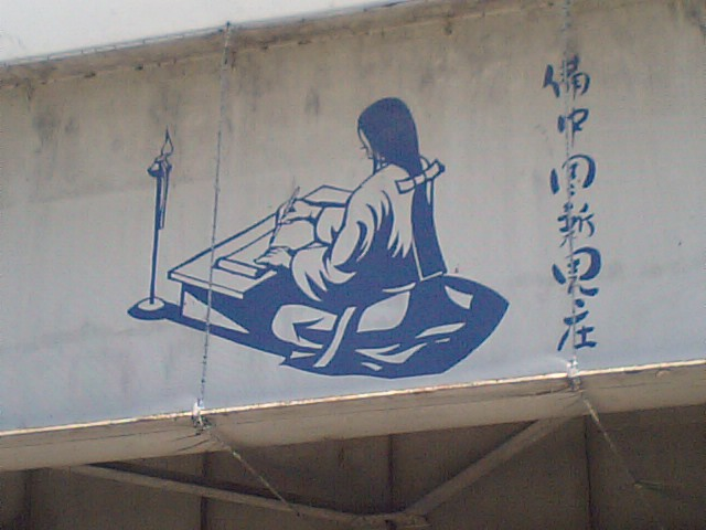 岡山県新見市の高速高架橋に描かれた「たまがき」のイラスト